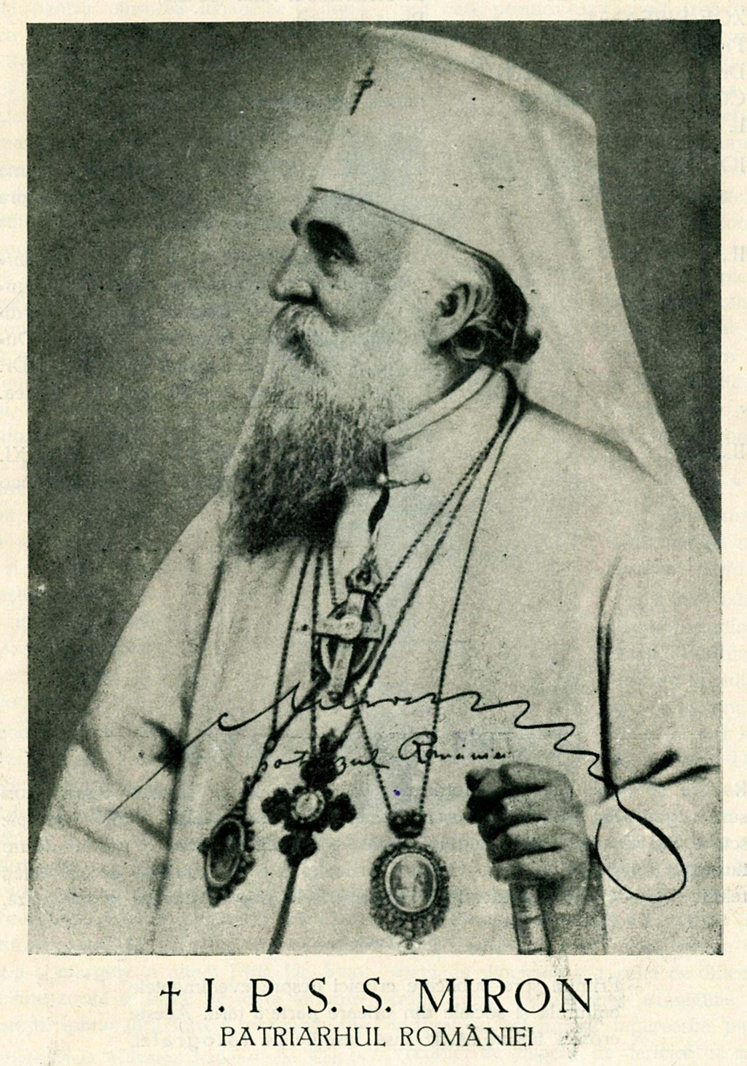 Patriarhul Romaniei - Miron Cristea